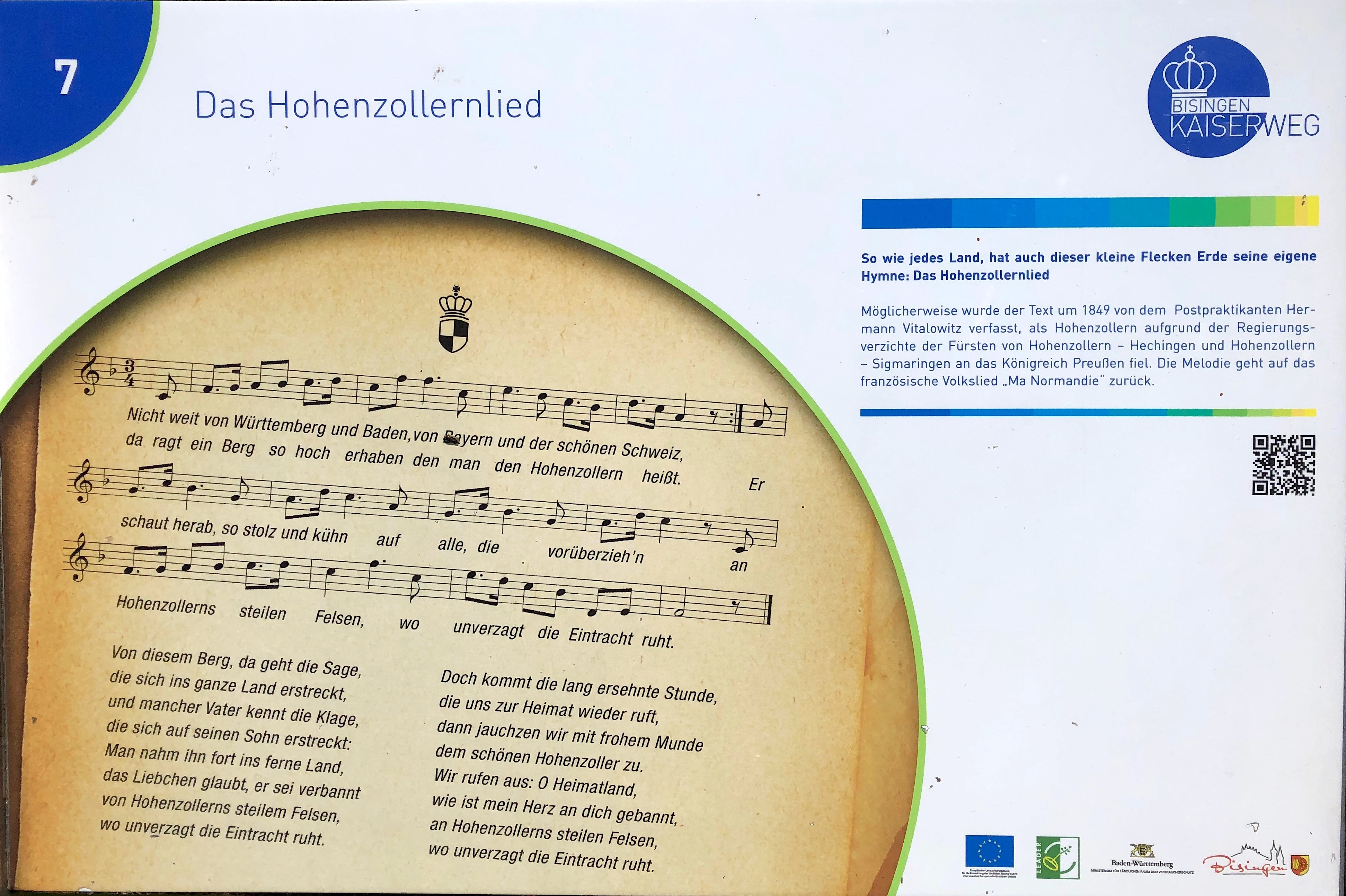 Das Hohenzollernlied